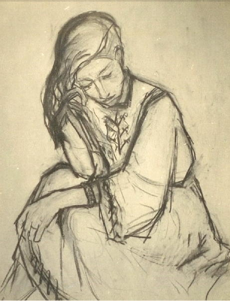 Depicted person: Lore Henke